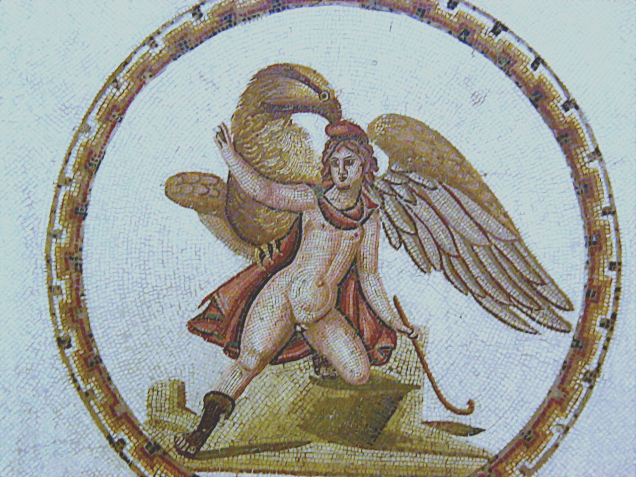 Mosaïque de l'enlèvement de Ganymède, Musée de Sousse